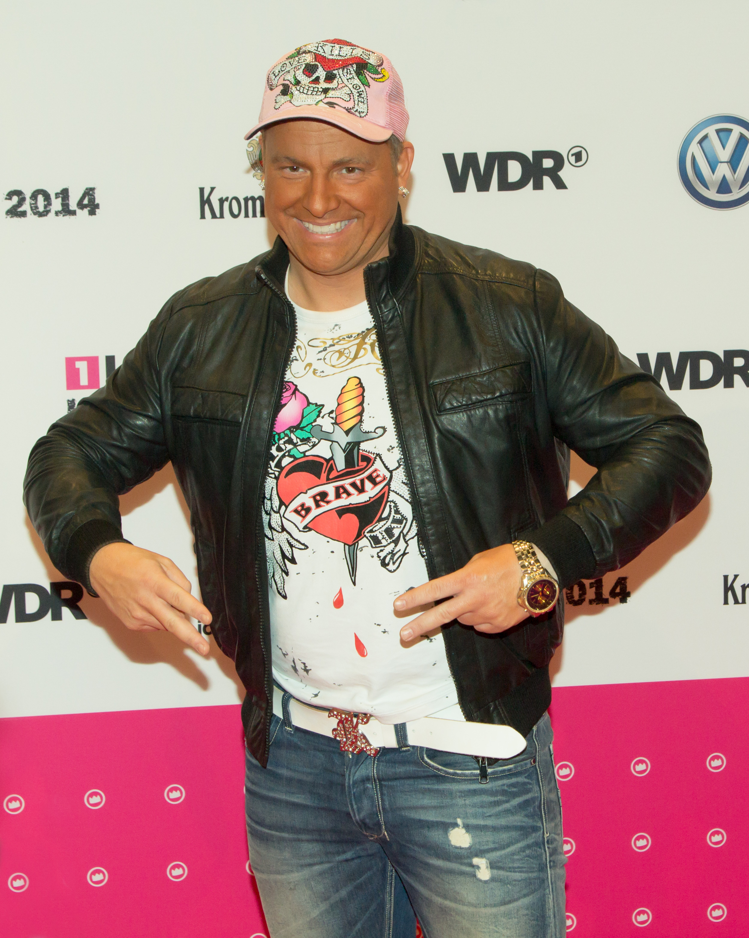 1LIVE Krone 2014 in der Bochumer Jahrhunderthalle: Dennis aus Hürth, eine bekannte Figur des Komikers Martin Klempnow